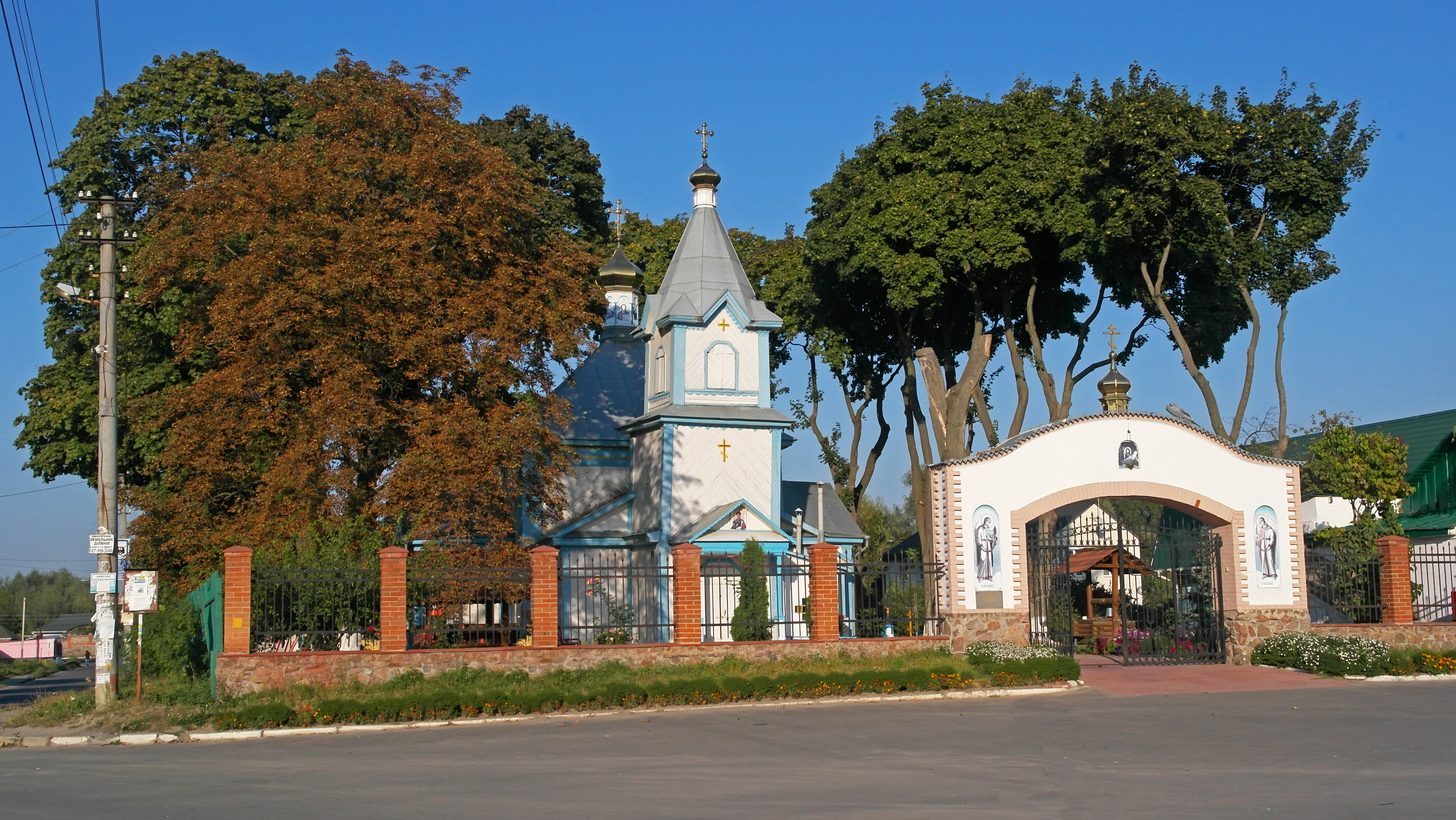 Церква Дмитрія Солунського, Київ, Повітрофлотська вул., 1 (Жуляни)